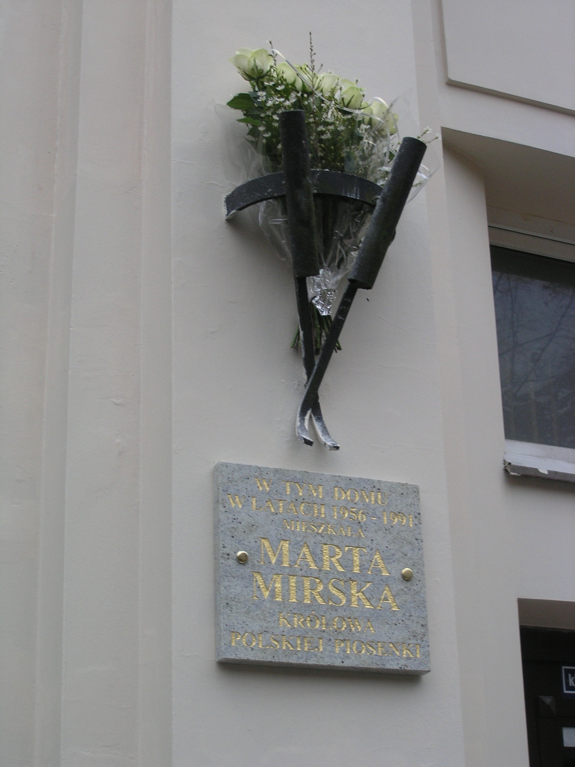 Tablica na Domu Marty Mirskiej w Alei Wyzwolenia 9 w Warszawie (odsłoniecie tablicy w 20 rocznicę śmierci Artystki w 2011)